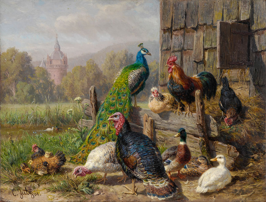 Carl Jutz: Buntes Federvieh, 1901, Öl auf Holz, 17,5 x 23 cm